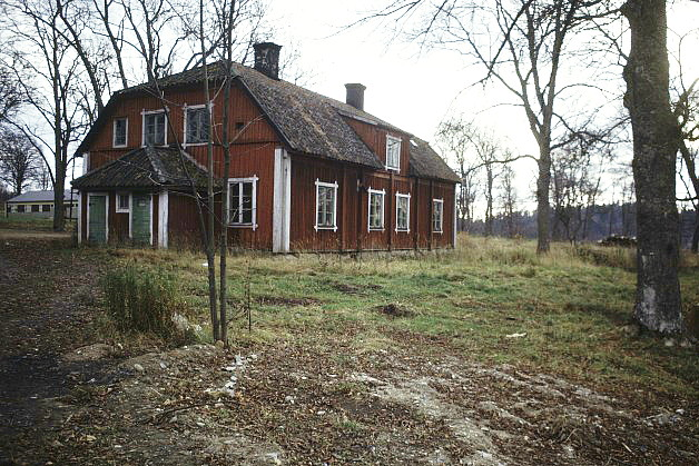 Näsby gård i Botkyrka kommun. Byggnaden riven, på platsen ligger Anstalten Asptuna